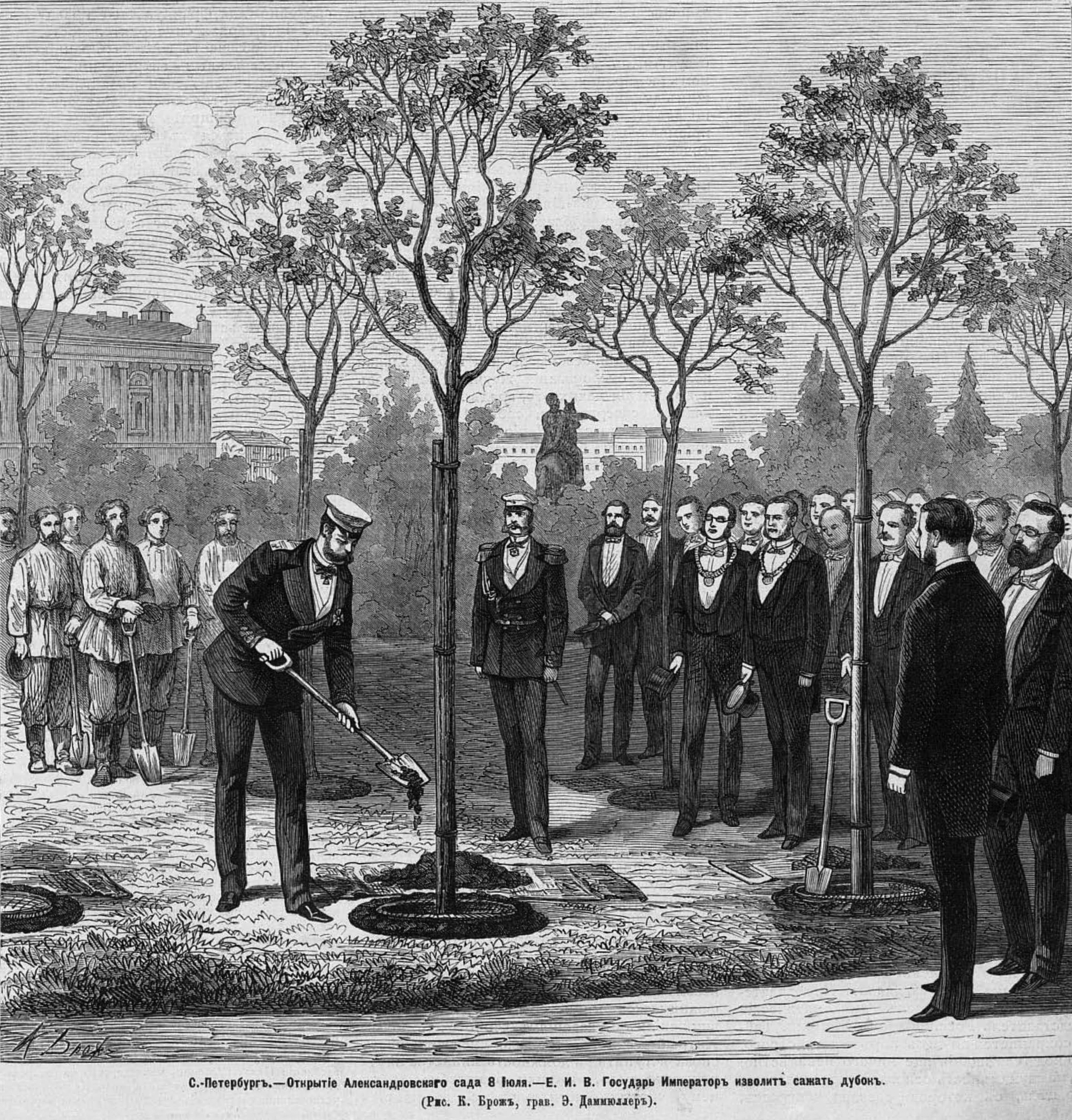 Император Александр II сажает дубок в Александровском саду, 1874